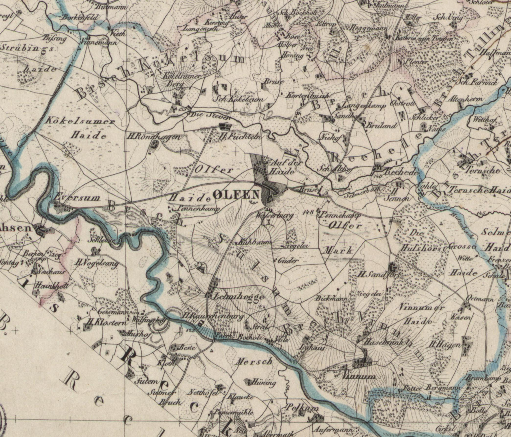 Location of Kirchspiel Olfen